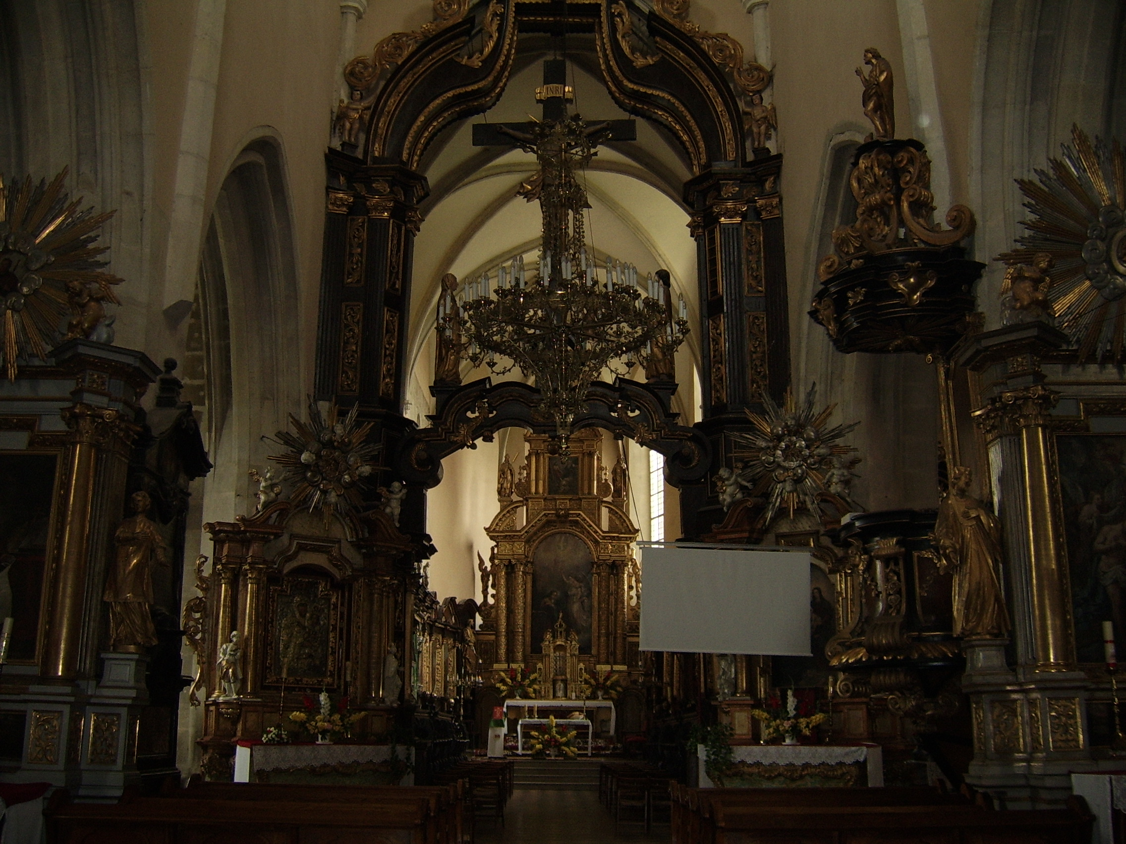 Skalbmierz - kościół parafialny, wnętrze, nawa główna.